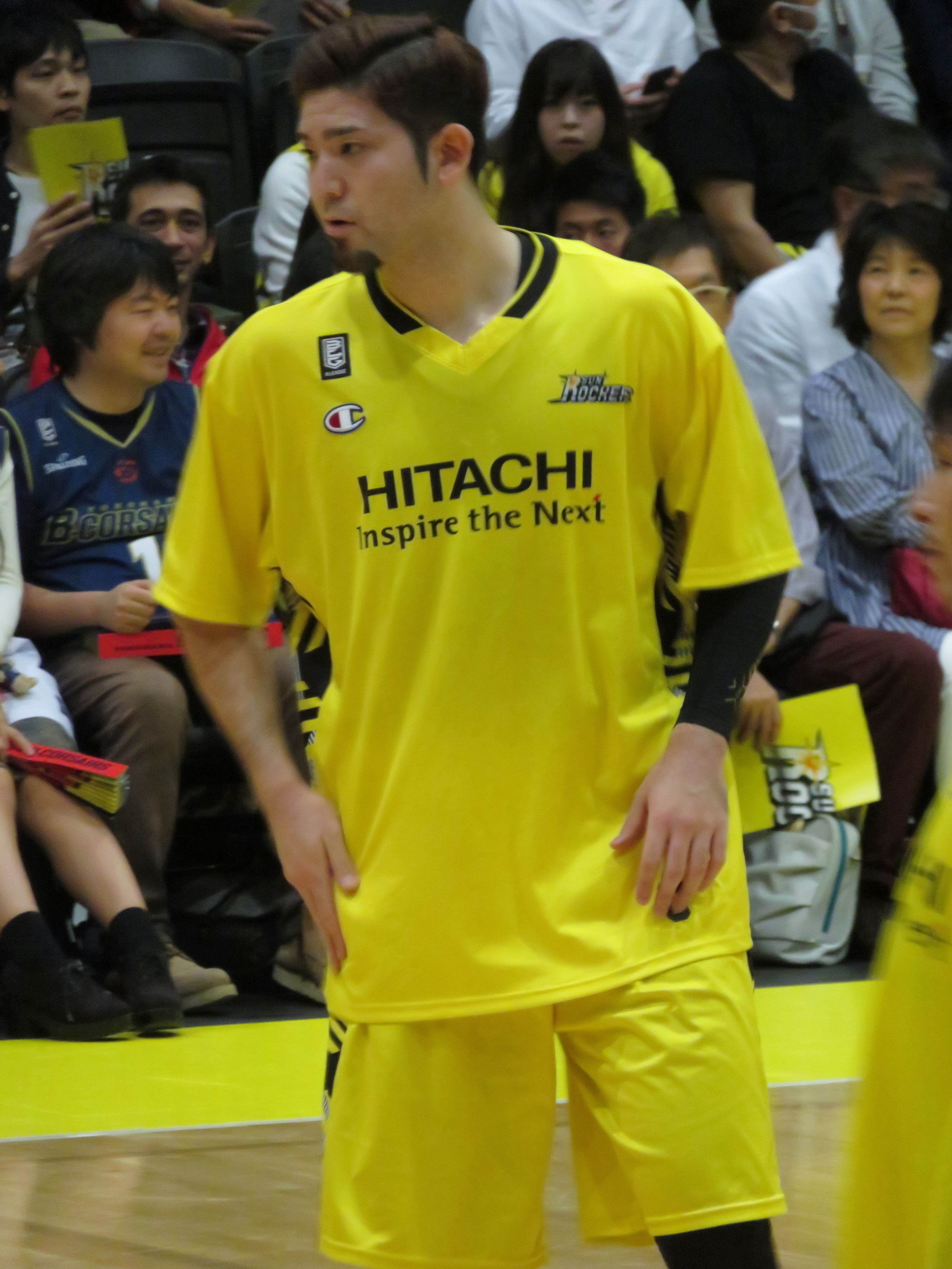 2018年10月28日撮影 2018-19 B1 第六節 渋谷-横浜 青山学院記念館